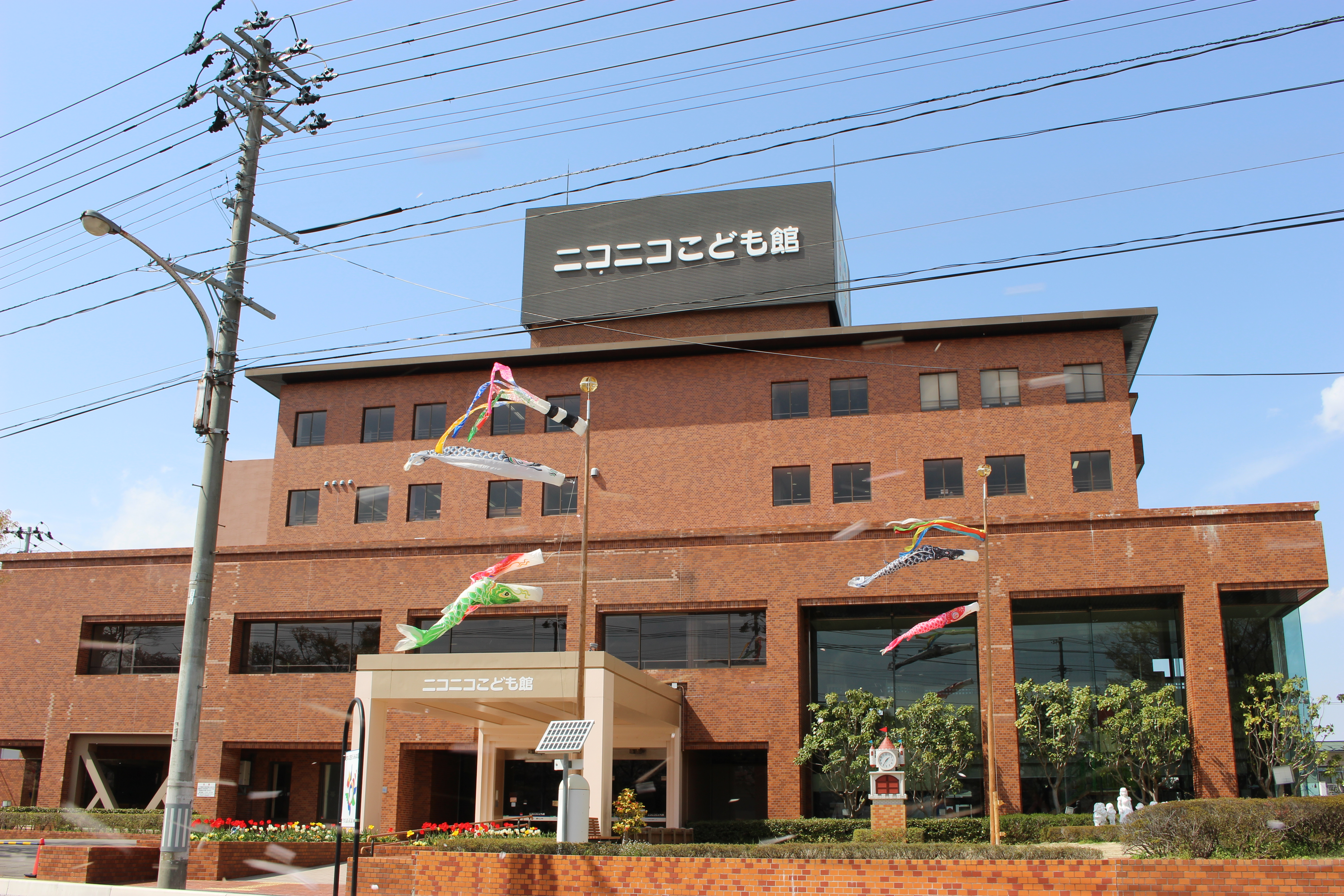 ニコニコこども館（郡山市）